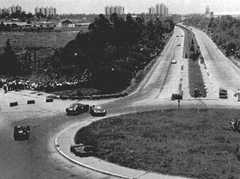 Fotografía del Puente de la Noria, publicada hace más de 25 años en Argentina por lo cual su copyright expiró